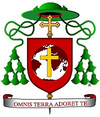 Znak biskupa Štefana Vrablece, Bratislava